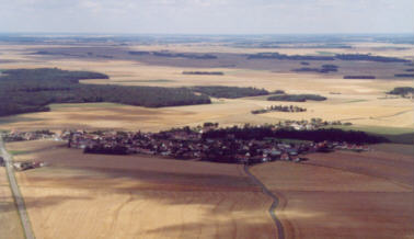 Bailleau-l'Évêque, vue aérienne Auteur : Mathieu Leplatre Cette photo a été prise lors d'un vol en avion en Eure-et-Loir